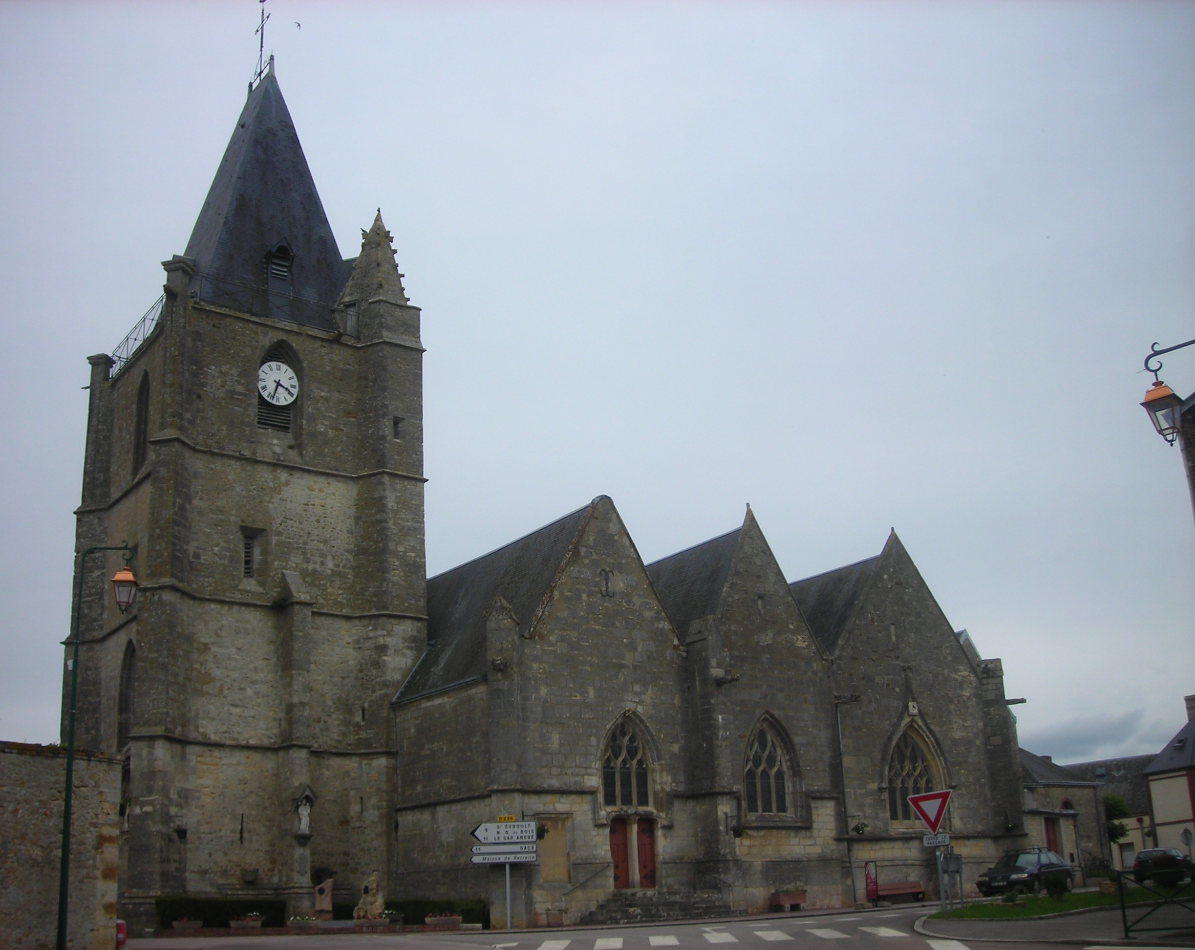 Église du village d'Échauffour (Orne, France)